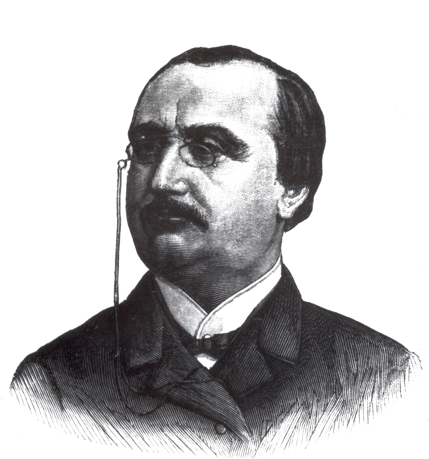 Monsieur Jules Bara, Ministre de la Justice dans le gouvernement Frère-Orban